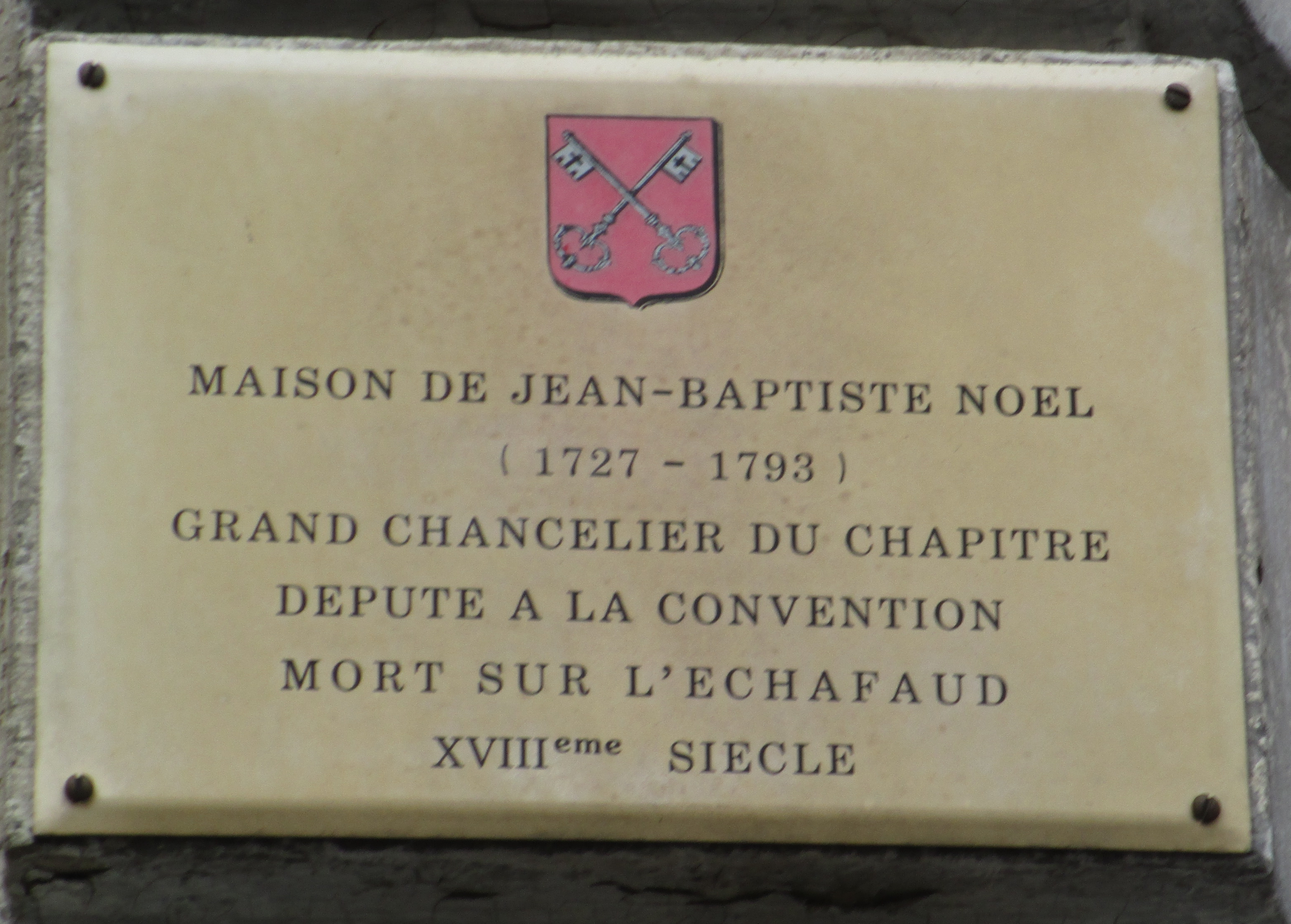 Plaque sur la maison de Jean-Baptiste NOEL, 12 rue de la Franche Pierre, Remiremont, Vosges, France